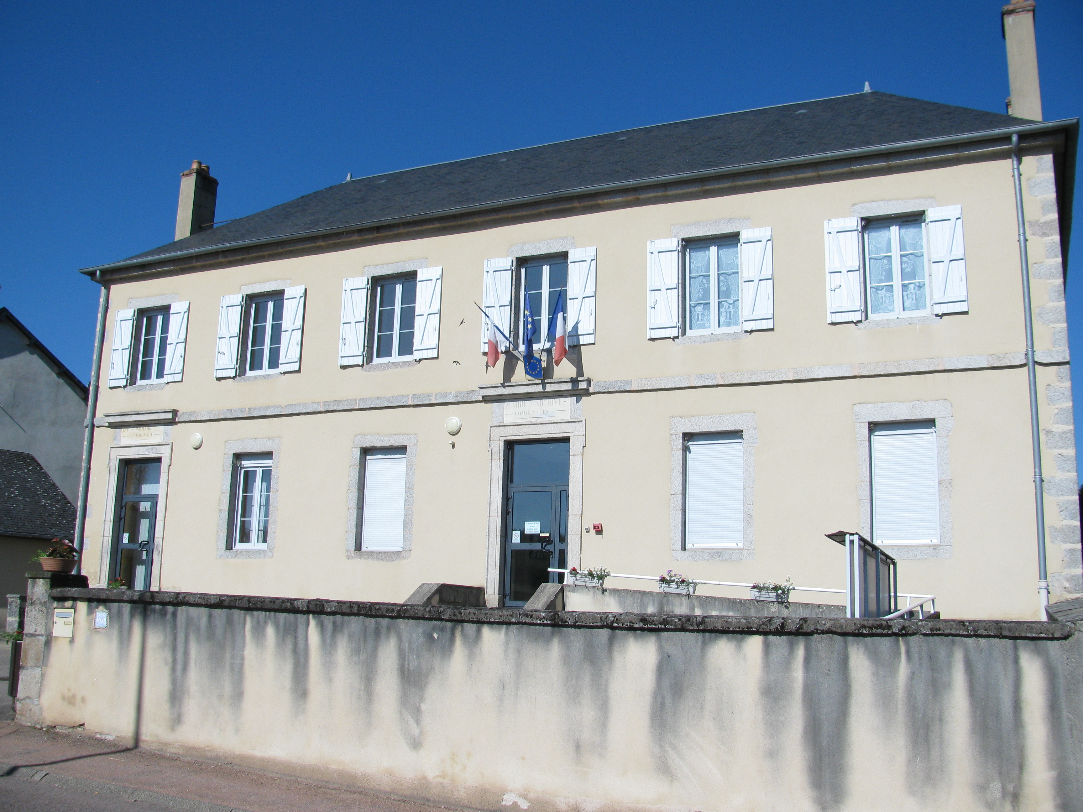 Mairie d'Alligny-en-Morvan, Nièvre, France.